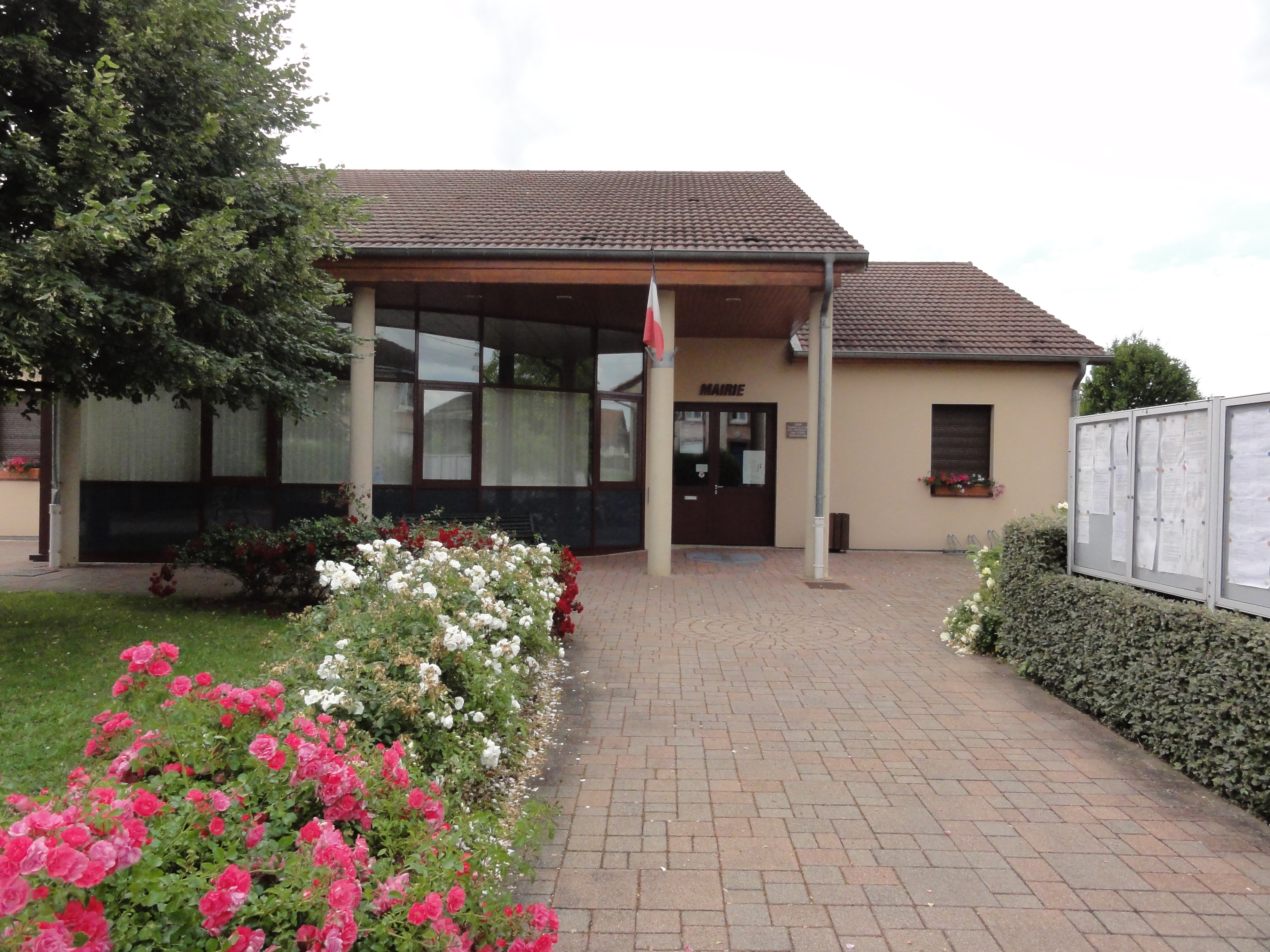 Saint-Clément (M-et-M) mairie